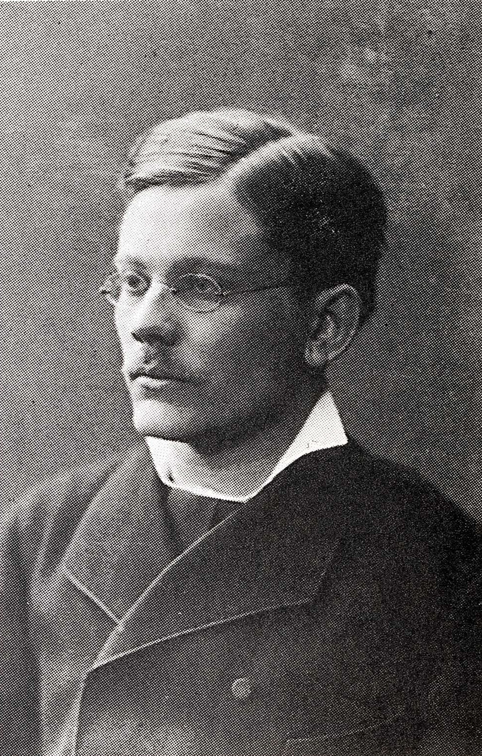 Opiskelijapoliitikko Lauri Kivekäs (1852–1893).